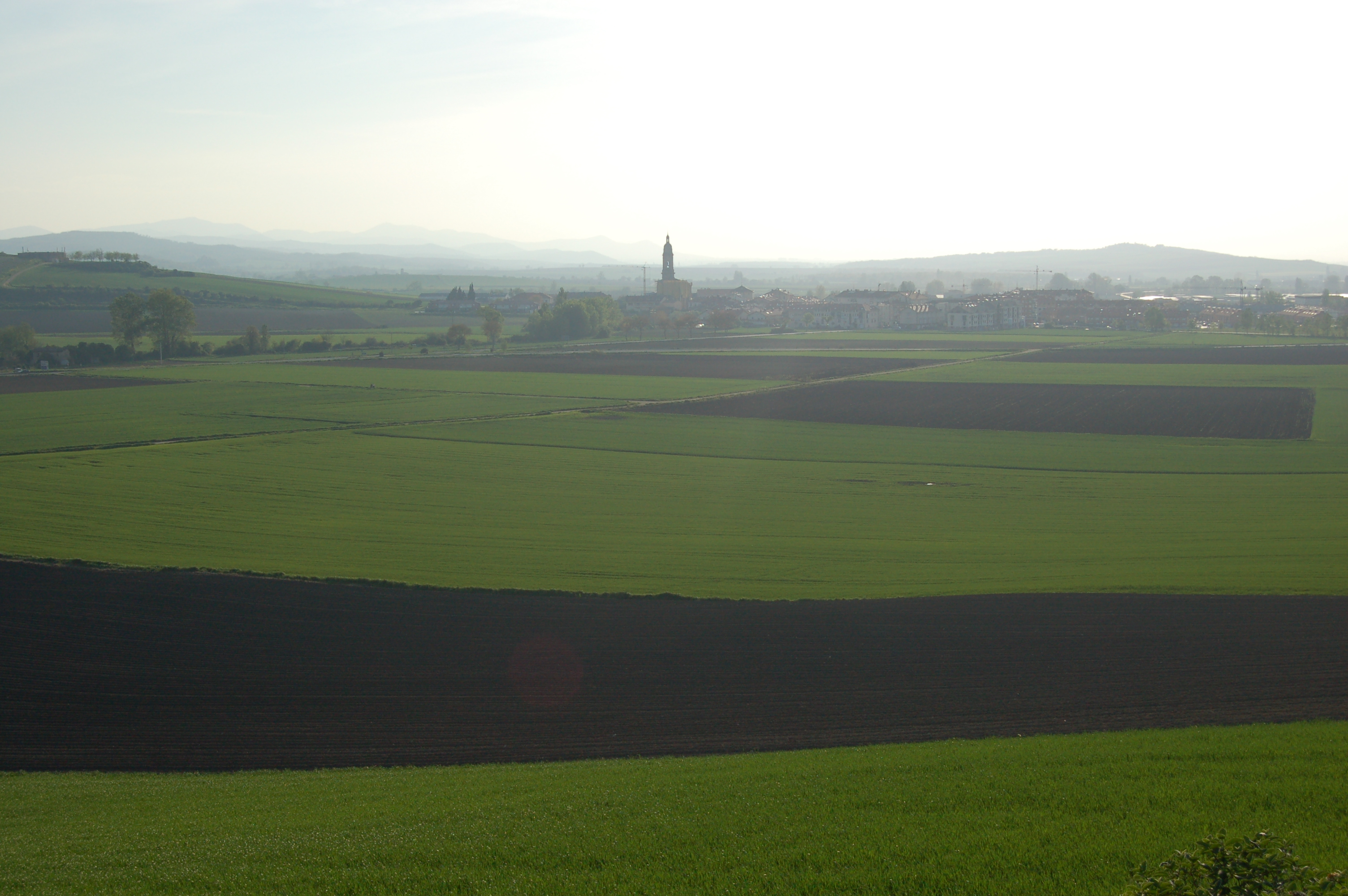 Dulantziko inguruaren ikuspegia.